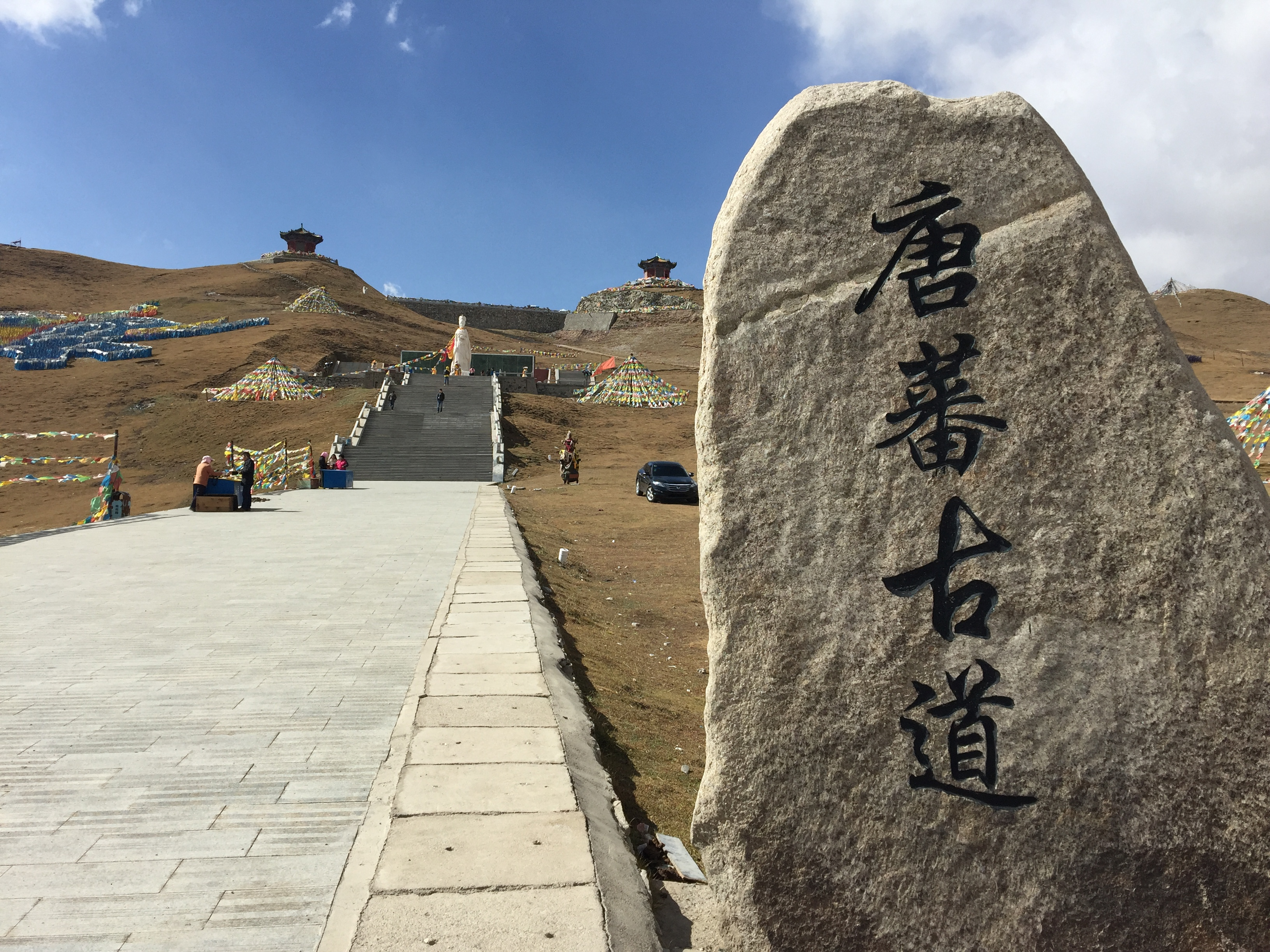 日月山纵览：日月亭、文成公主雕像及唐蕃古道纪念碑。